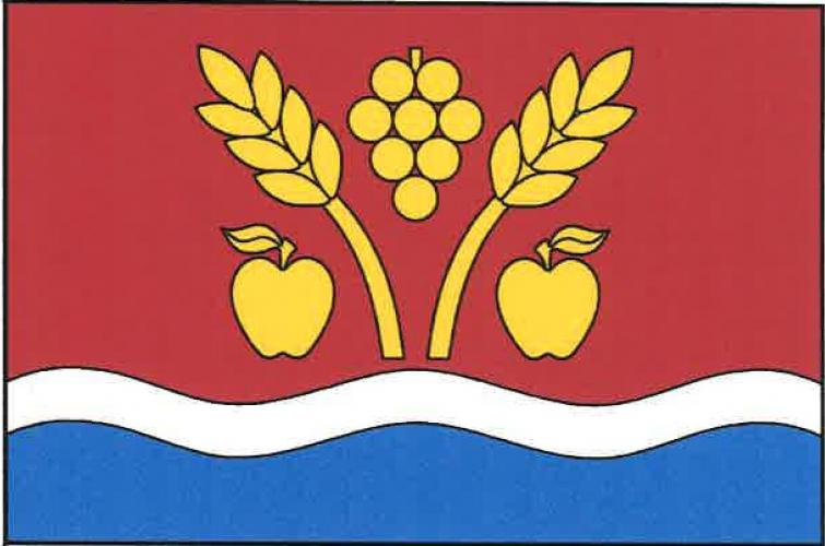 vlajka, Lhotka nad Labem, okres Litoměřice